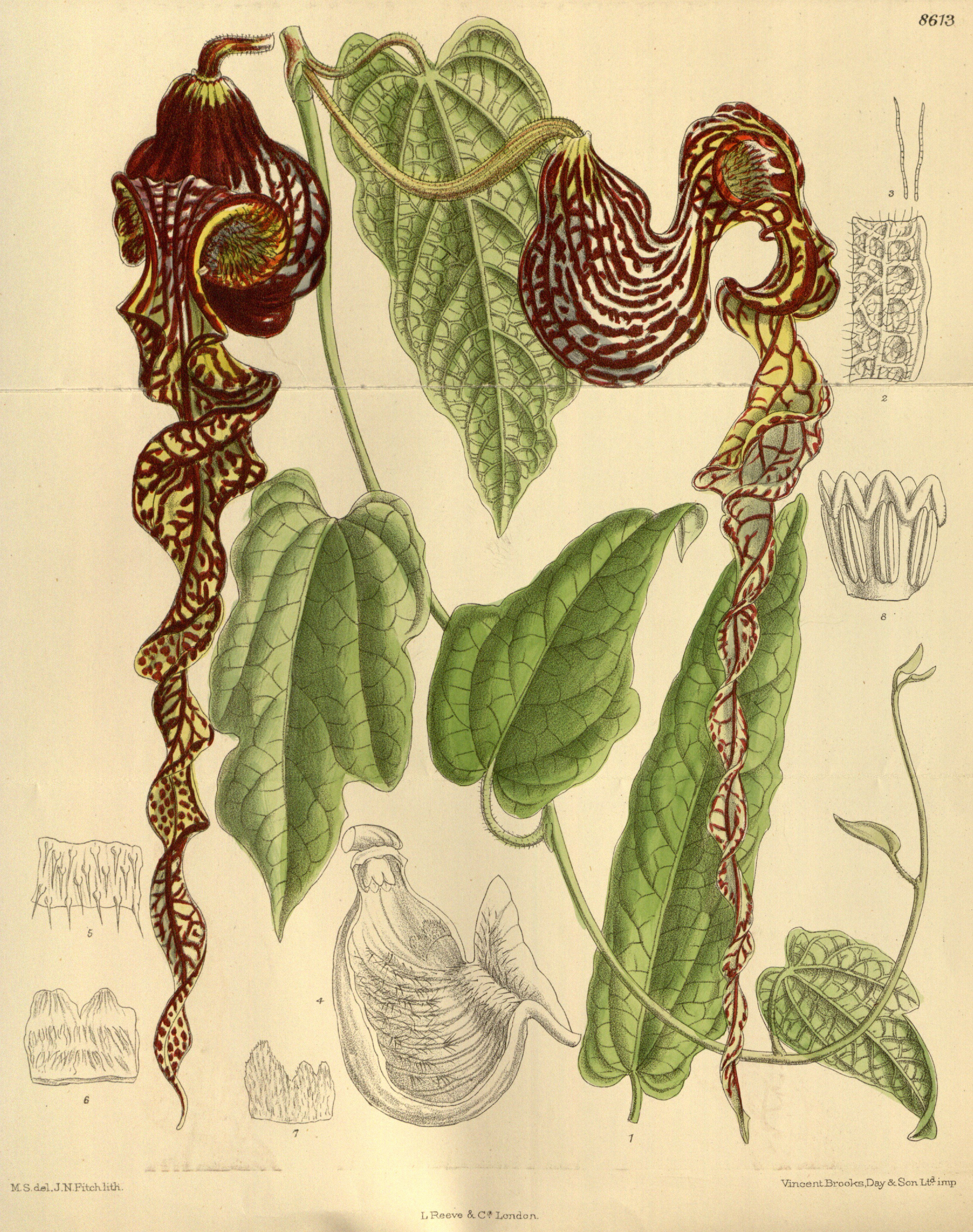 Aristolochia longecaudata (= Aristolochia weddellii var. rondoniana), Aristolochiaceae